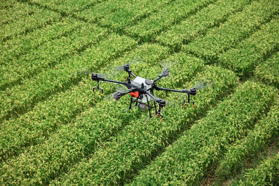 Dron batek lur-azalera baten gainean hegan egiten